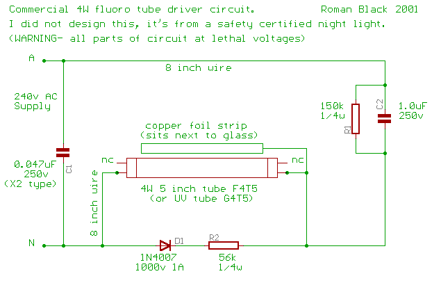 Diagrama para lampara borradora de eprom-UV-C